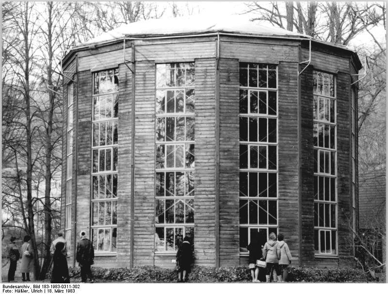 Dresden, Schloßgarten Pillnitz, Glashaus ADN-ZB Häßler 18.3.1983-me Dresden: Eine 200 Jahre alte Kamelie kann in diesem heizbaren Glashaus im Schloßgarten Pillnitz alljährlich zur Blütezeit von den Naturfreunden bewundert werden. Es ist die letzte von vier dieser mit dem Teestrauch verwandten immergrünen Pflanzen, die um 1770 aus Japan nach Europa gebracht wurden. Die Kamelie ist neun Meter hoch und acht Meter breit und gehört zu den botanischen Seltenheiten Europas. (siehe auch 1983-0311-300, 1983-0311-301)